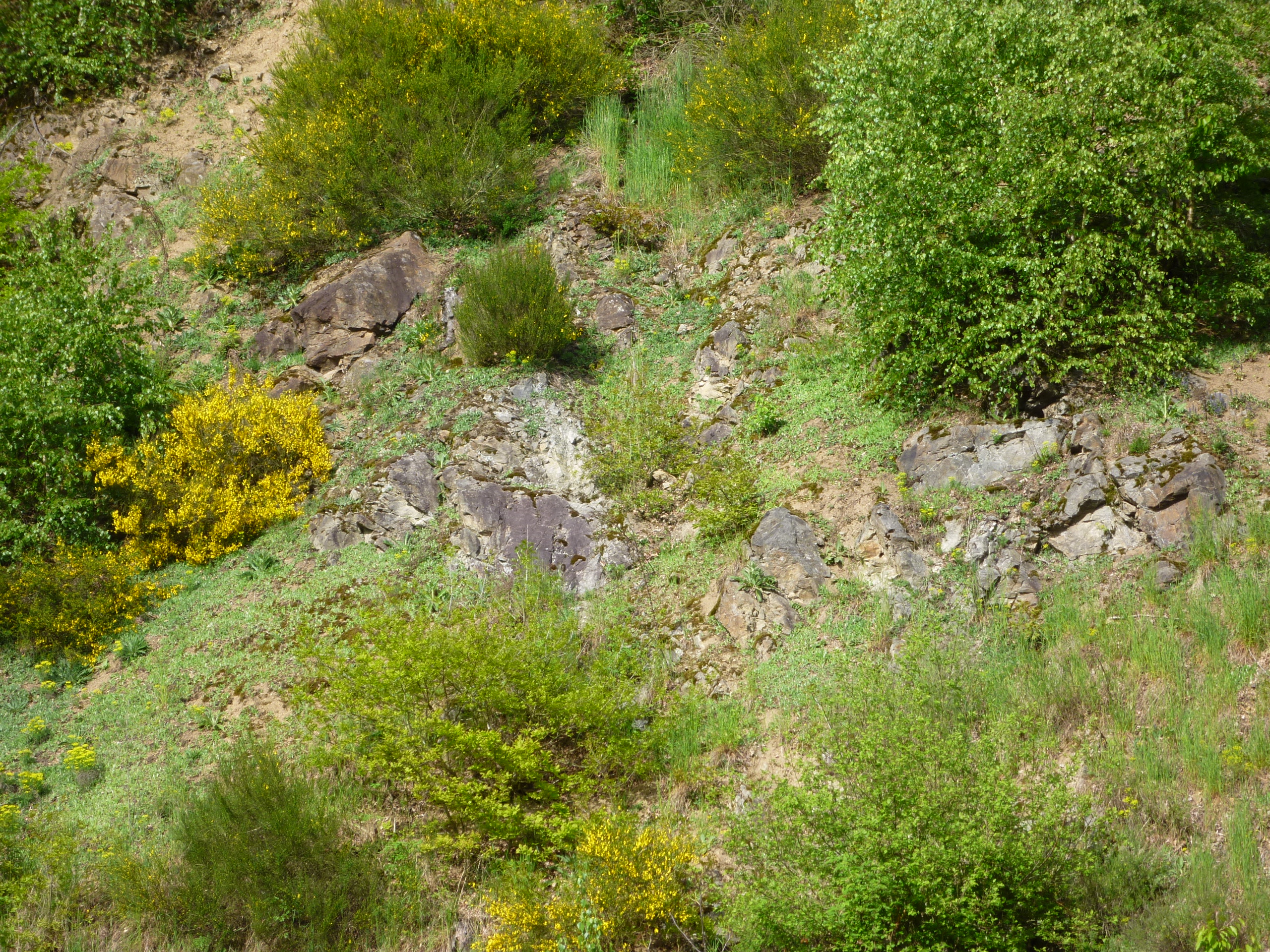 Kleiner aufgelassener Steinbruch zwischen Pfelling und Anning im Landkreis Straubing-Bogen. Geotop-Nr. 278A019.